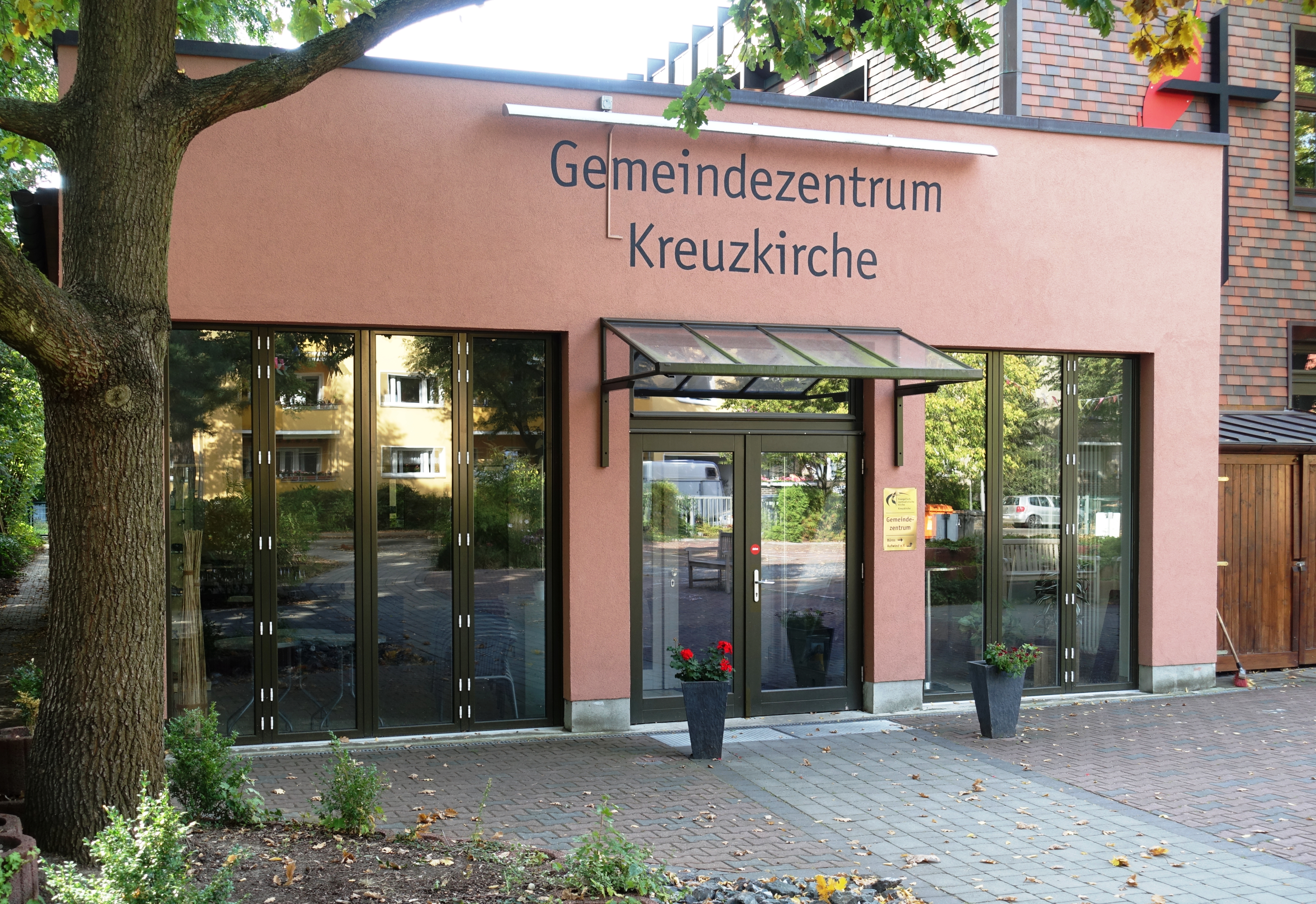 Eingang zum Gemeindezentrum